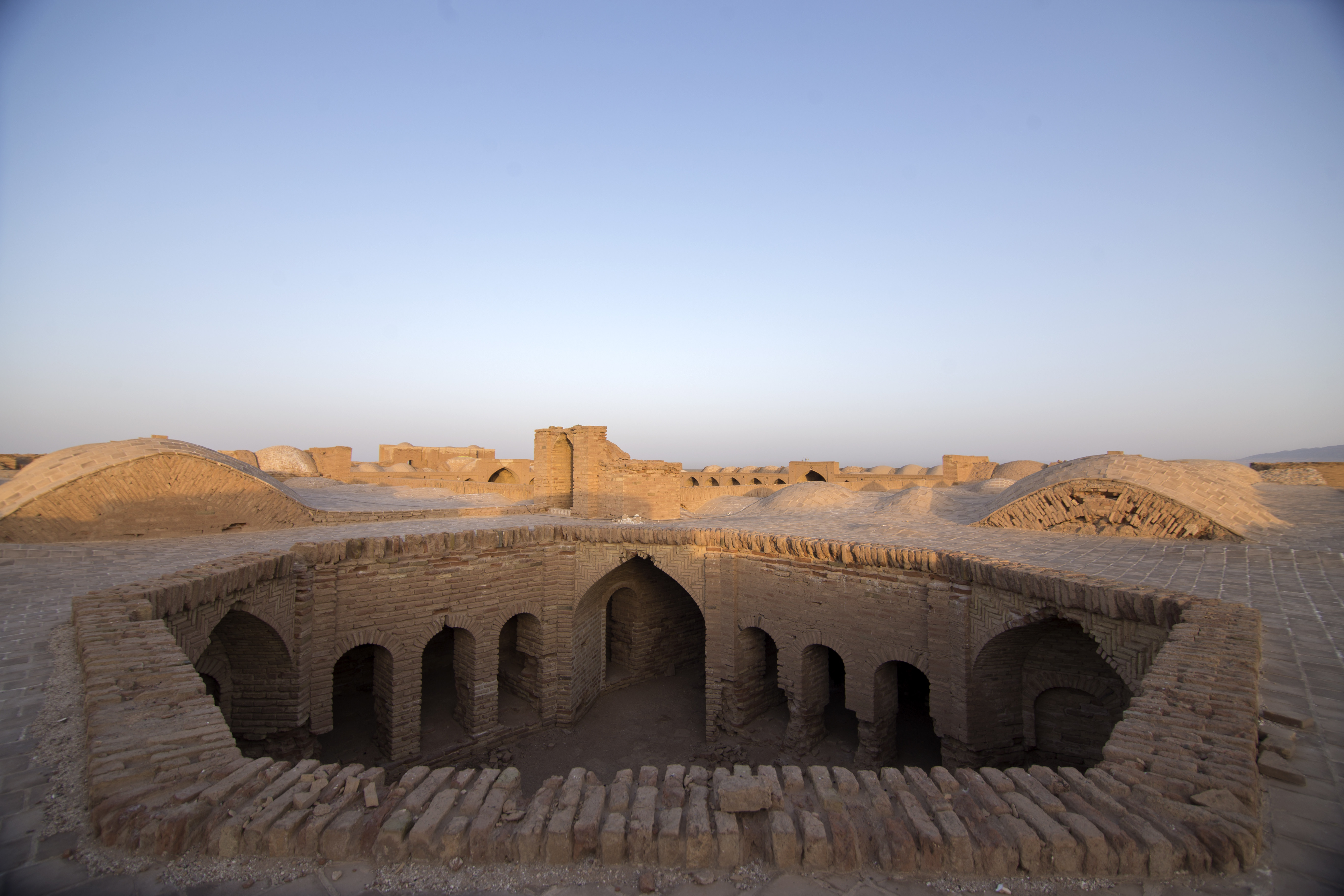 کاروانسرای دیر گچین یکی از بزرگ‌ترین کاروانسراهای ایران و دارای ویژگی‌های منحصربه‌فردی است که با بناهای مشابه، تفاوت دارد و باعث شده آن را مادر کاروانسراهای ایران بنامند. معماری این کاروانسرا مربوط به دوره ساسانی و صفوی است و در شهرستان قم، بخش مرکزی، ۸۰ کیلومتری شرق قم (کیلومتر ۶۰ بزرگراه گرمسار) و ۳۵ کیلومتری جنوب‌غربی ورامین واقع شده‌است. این اثر در تاریخ ۱ مهر ۱۳۸۲ با شمارهٔ ثبت ۱۰۴۰۸ به عنوان یکی از آثار ملی ایران به ثبت رسیده‌است